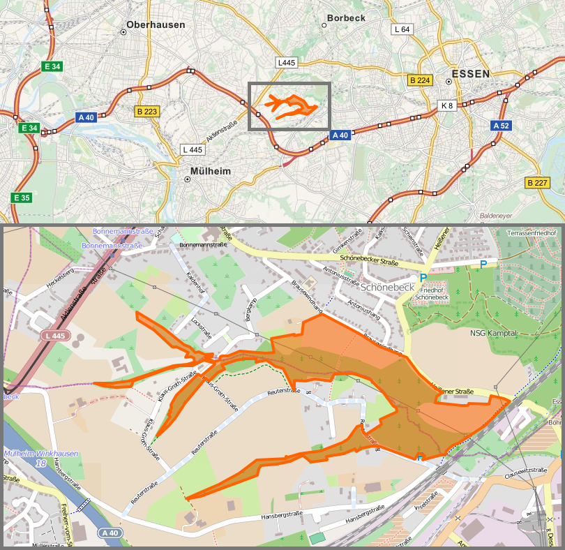 Naturschutzgebiet Winkhauser Tal (NSG E-007) in Essen und Naturschutzgebiet Winkhauser Bachtal (NSG MH-006) in Mülheim an der Ruhr – Karte